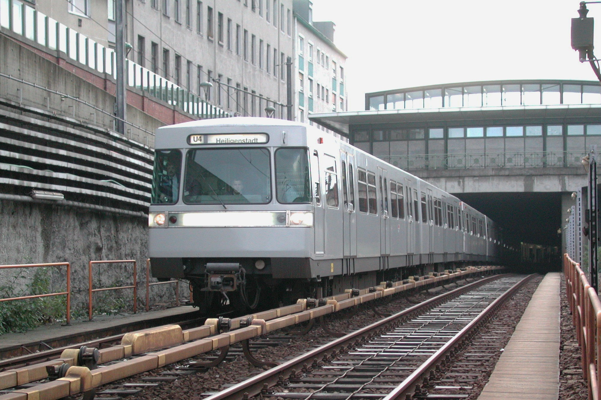 de: Zug der Linie U4 nach Heiligenstadt verlässt die Station Längenfeldgasse en: Train on U4 leaving Längenfeldgasse on it's way to Heiligenstadt